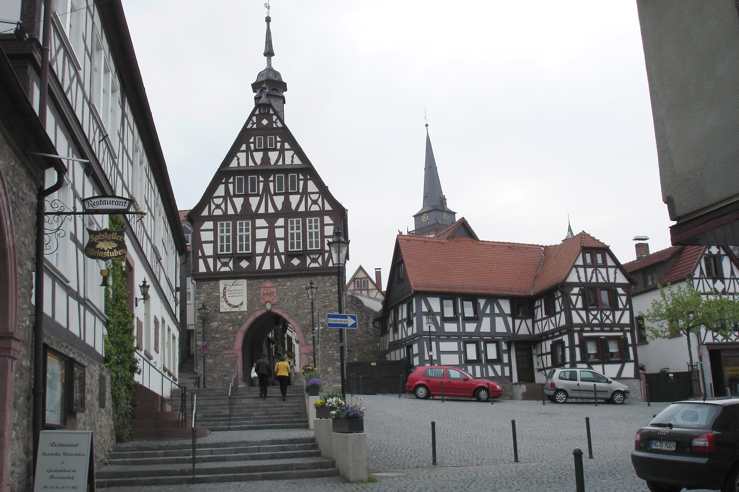 Blick vom Marktplatz Oberursel auf altes Rathaus und St. Ursula